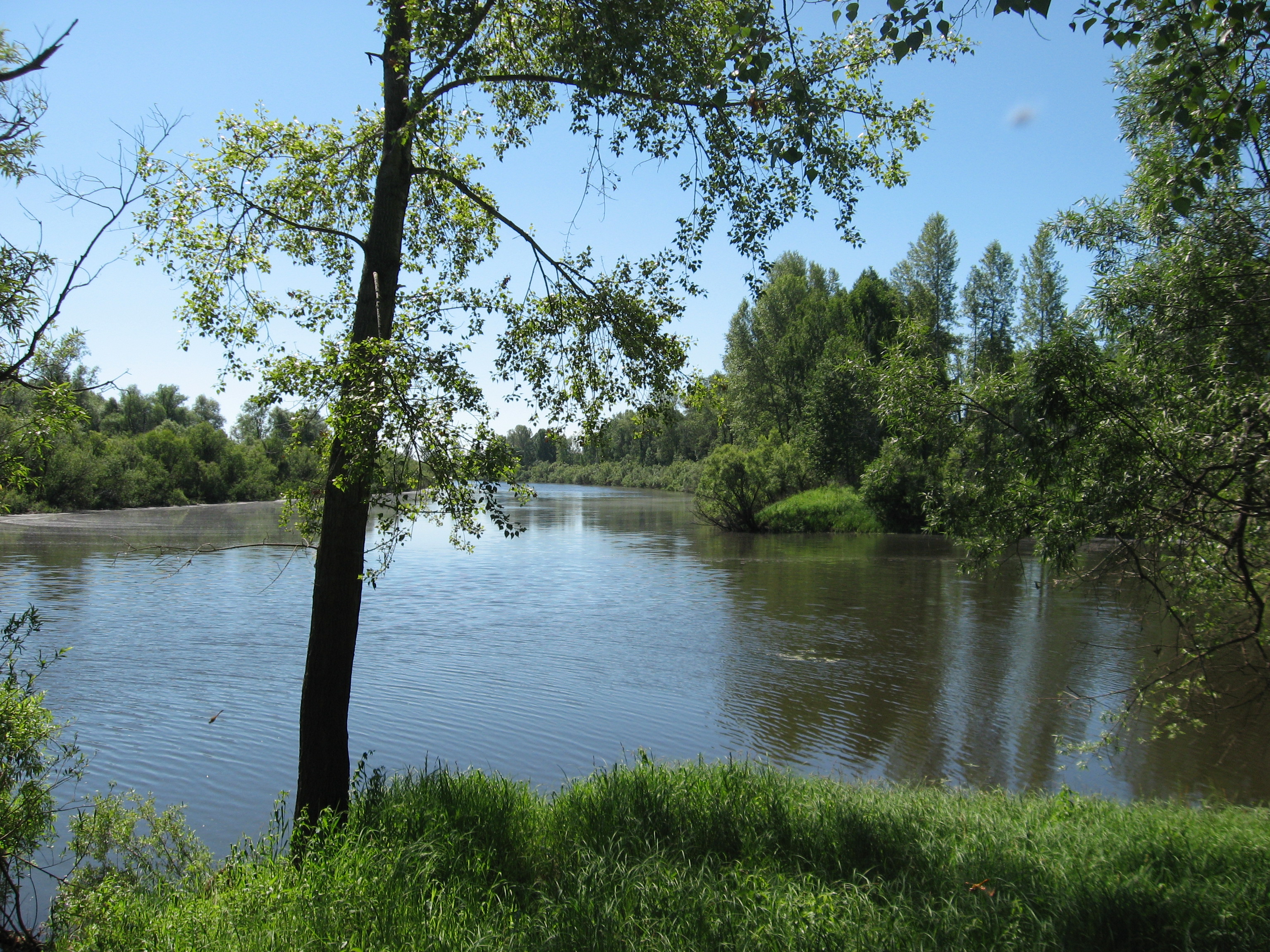 Протока Красная Курья, Asinovsky District, Tomsk Oblast, Russia